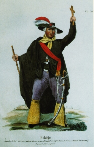 Portrait de Miguel Hidalgo